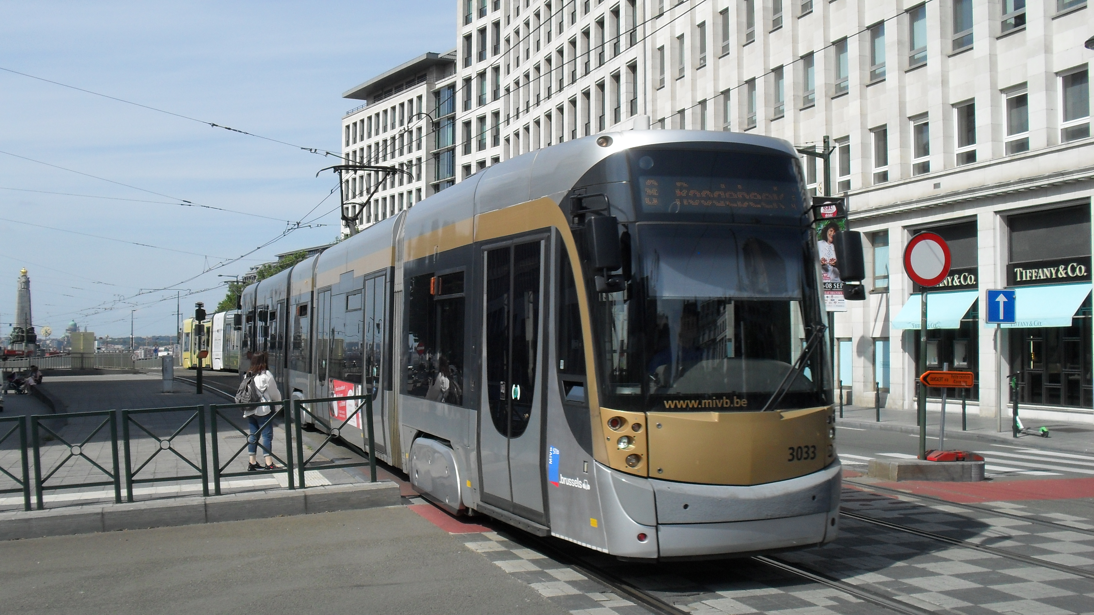 Tramway T3000 de la ligne 8 à Louise